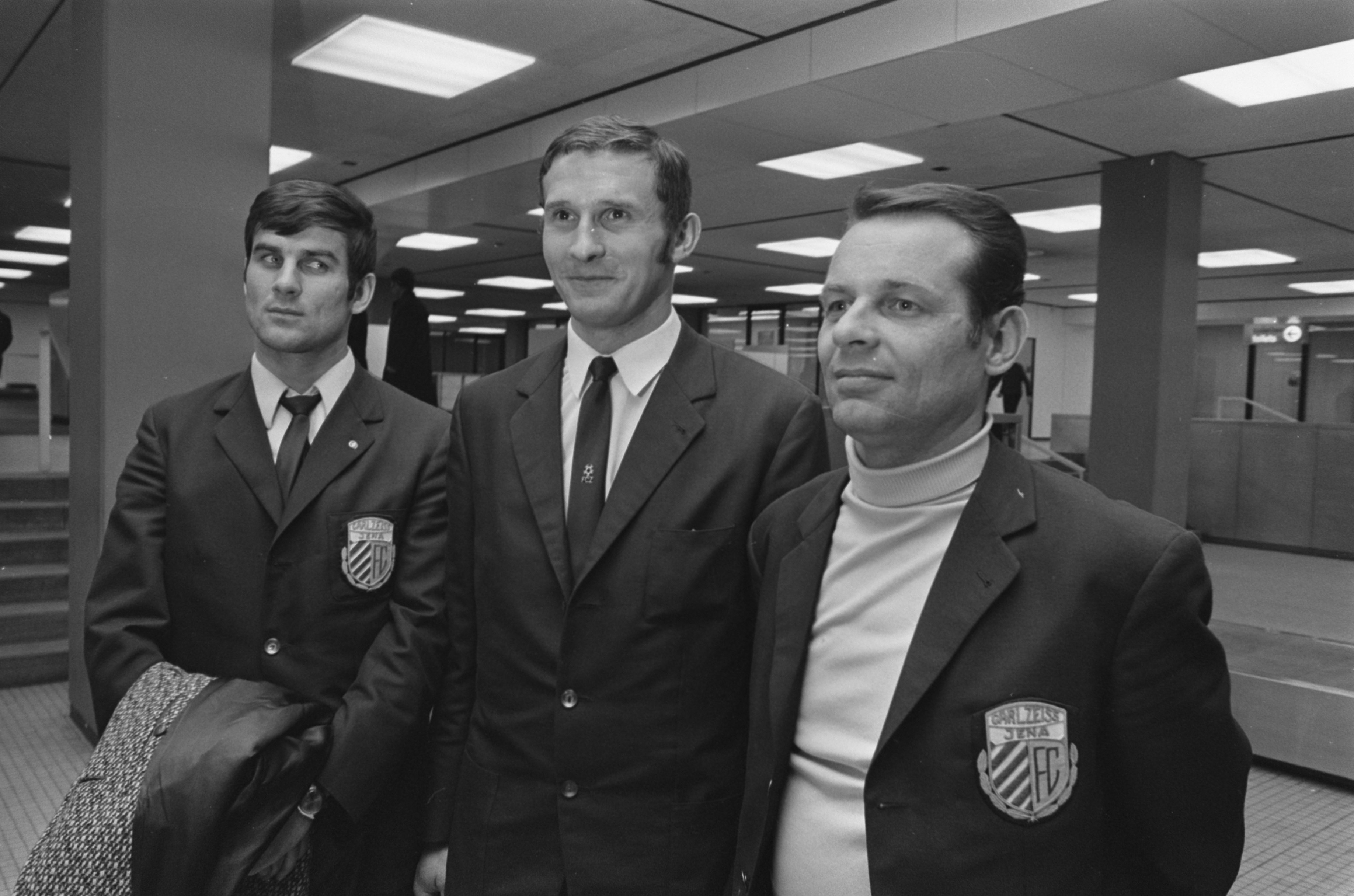 Collectie / Archief : Fotocollectie Anefo Reportage / Serie : [ onbekend ] Beschrijving : Elftal Carl Zeiss Jena arriveert op Schiphol voor wedstrijd tegen Ajax. Peter Ducke , keeper Wolfgang Blockwitz en Roland Ducke Datum : 10 maart 1970 Locatie : Noord-Holland, Schiphol Trefwoorden : vliegvelden, voetballers Persoonsnaam : Blockwitz, Wolfgang, Ducke, Roland, Ducke, Peter Fotograaf : Evers, Joost / Anefo Auteursrechthebbende : Nationaal Archief Materiaalsoort : Negatief (zwart/wit) Nummer archiefinventaris : bekijk toegang 2.24.01.05 Bestanddeelnummer : 923-3313